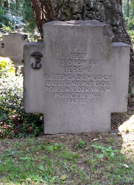 Grób Jerzego Zborowskiego na Powązkach wojskowych w Warszawie (fot Zu)